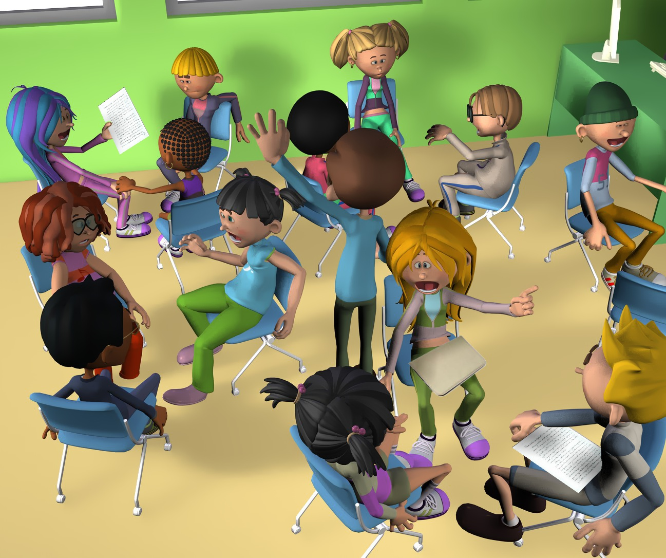 Talde-lana prestatzen_By_CeDeC